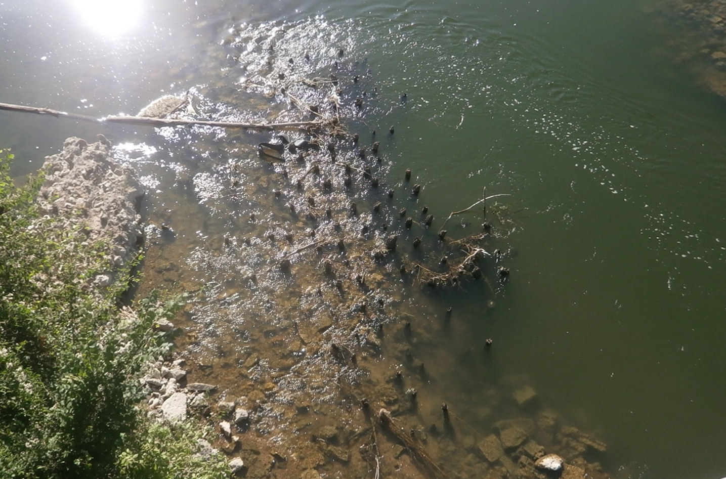 Pieux supportant les fondations du pont.